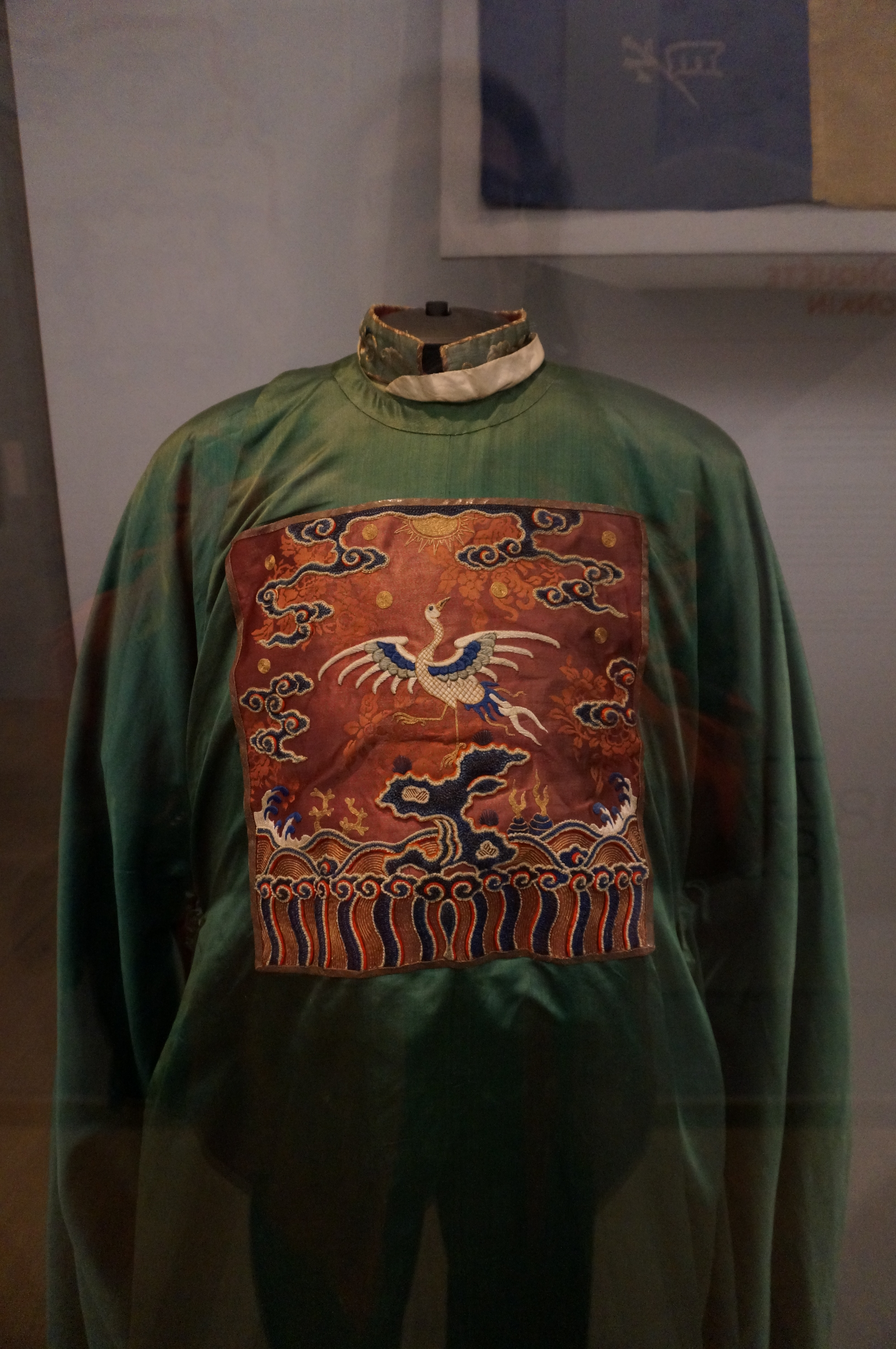 Costume d'apparat de Nguyen Tri Phuong présenté lors de Indochine des territoires et des hommes 1856 1956 .